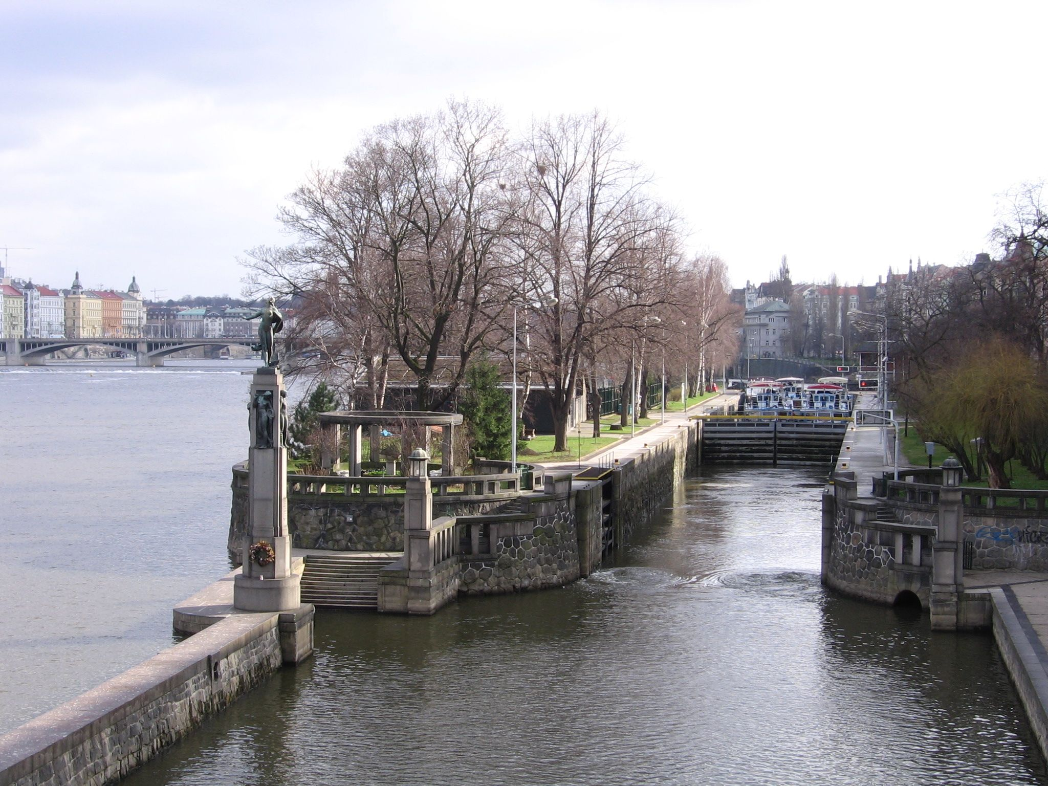 Dětský ostrov v Praze